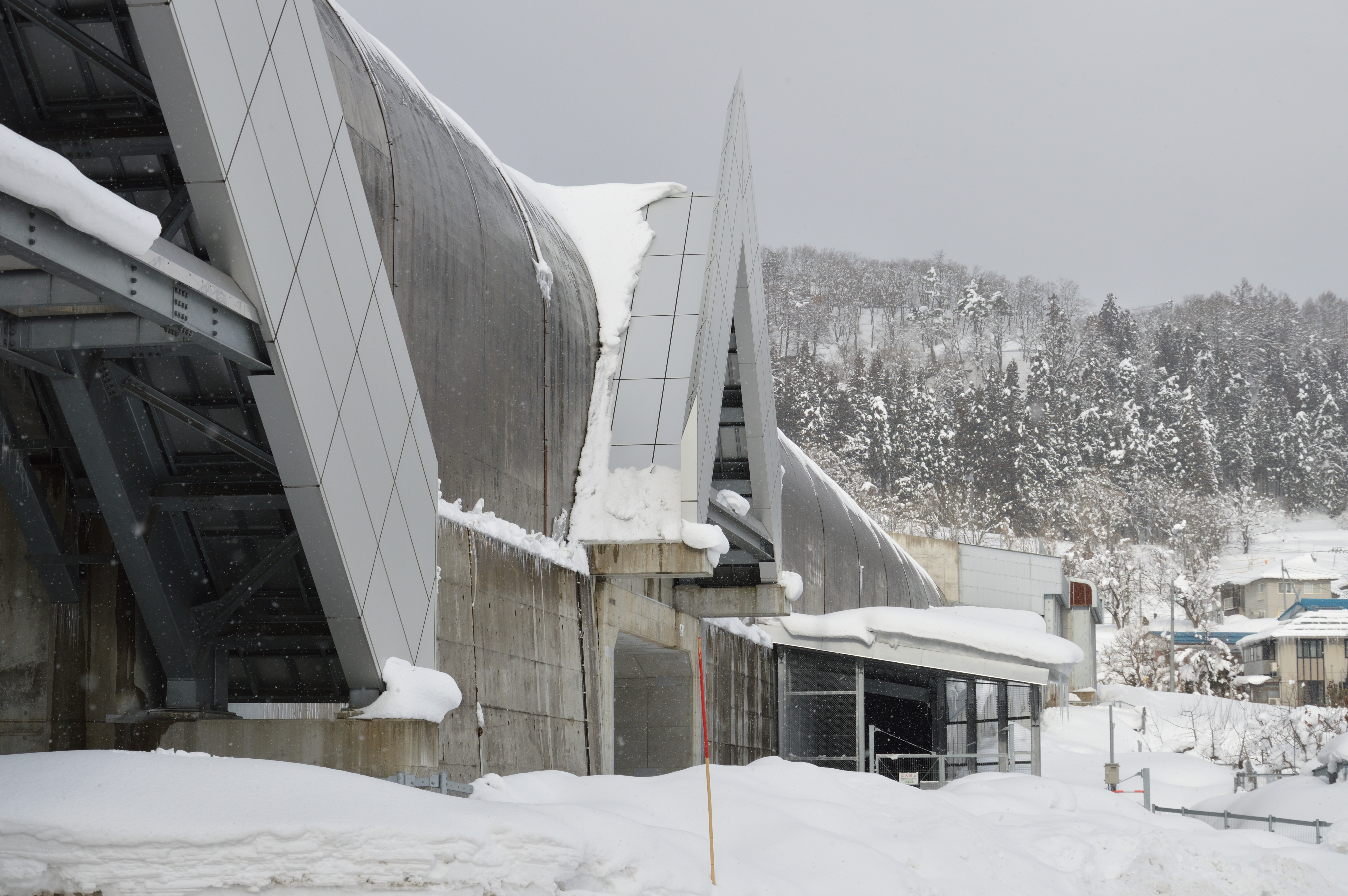 北陸新幹線飯山トンネル飯山方坑口付近。高架橋はスノーシェッドで覆われ、長峯トンネルと連続する。 Nikon D3200